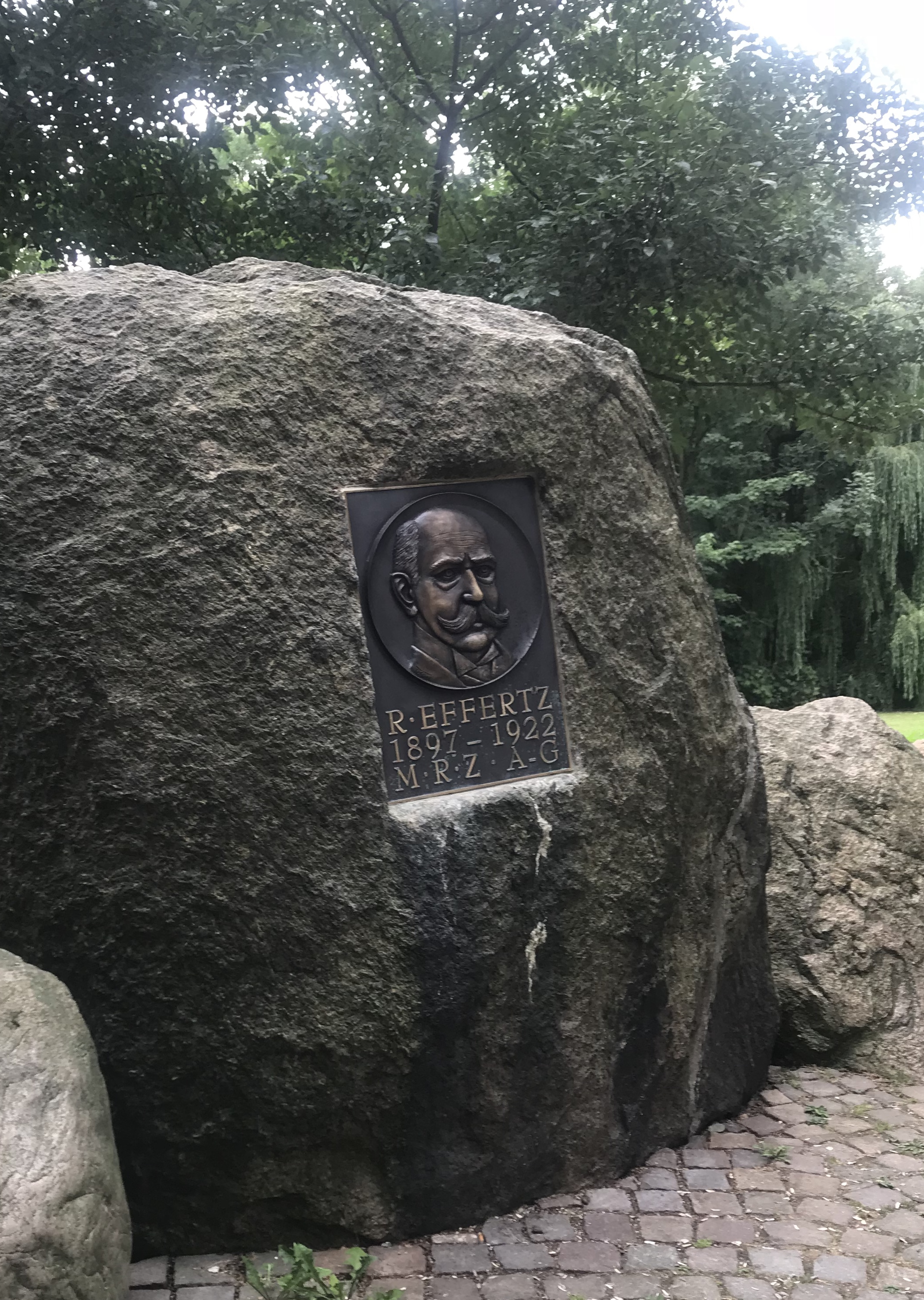 Effertz-Denkmal im Kurpark Unna nach der Restaurierung im Jahr 2018.